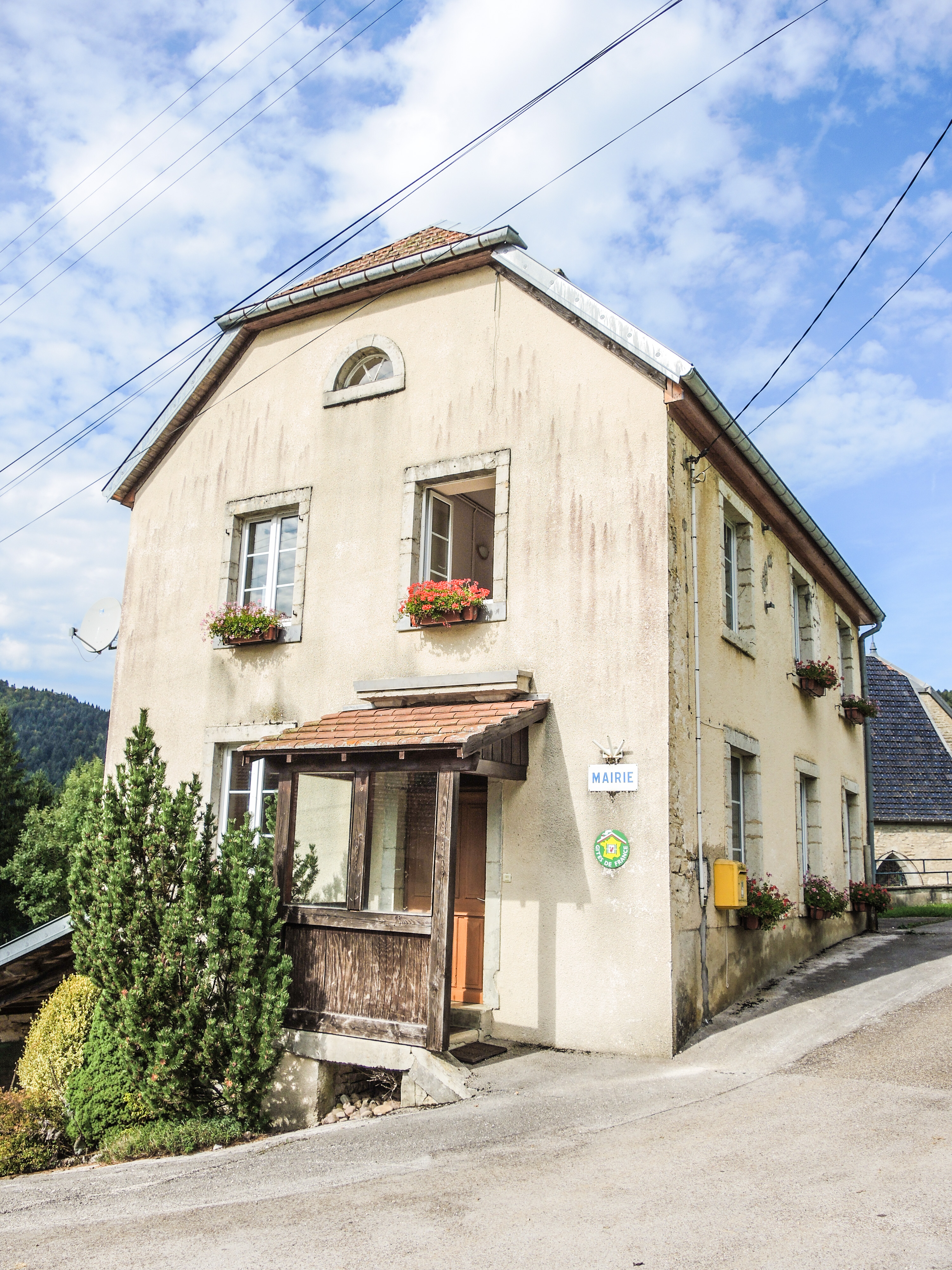 Mairie de Laval-le-Prieuré. Doubs